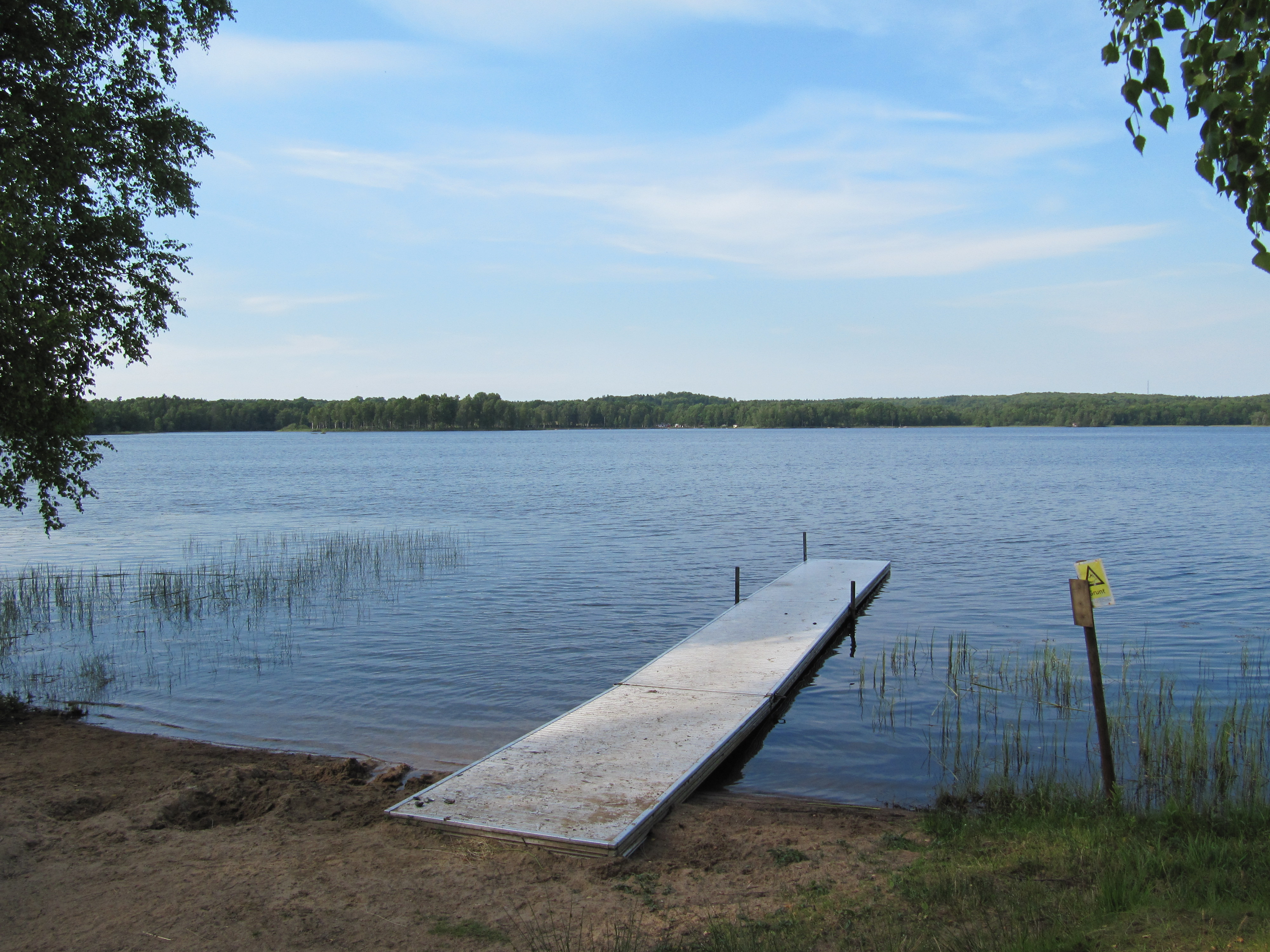 Lursjön från västra sidan